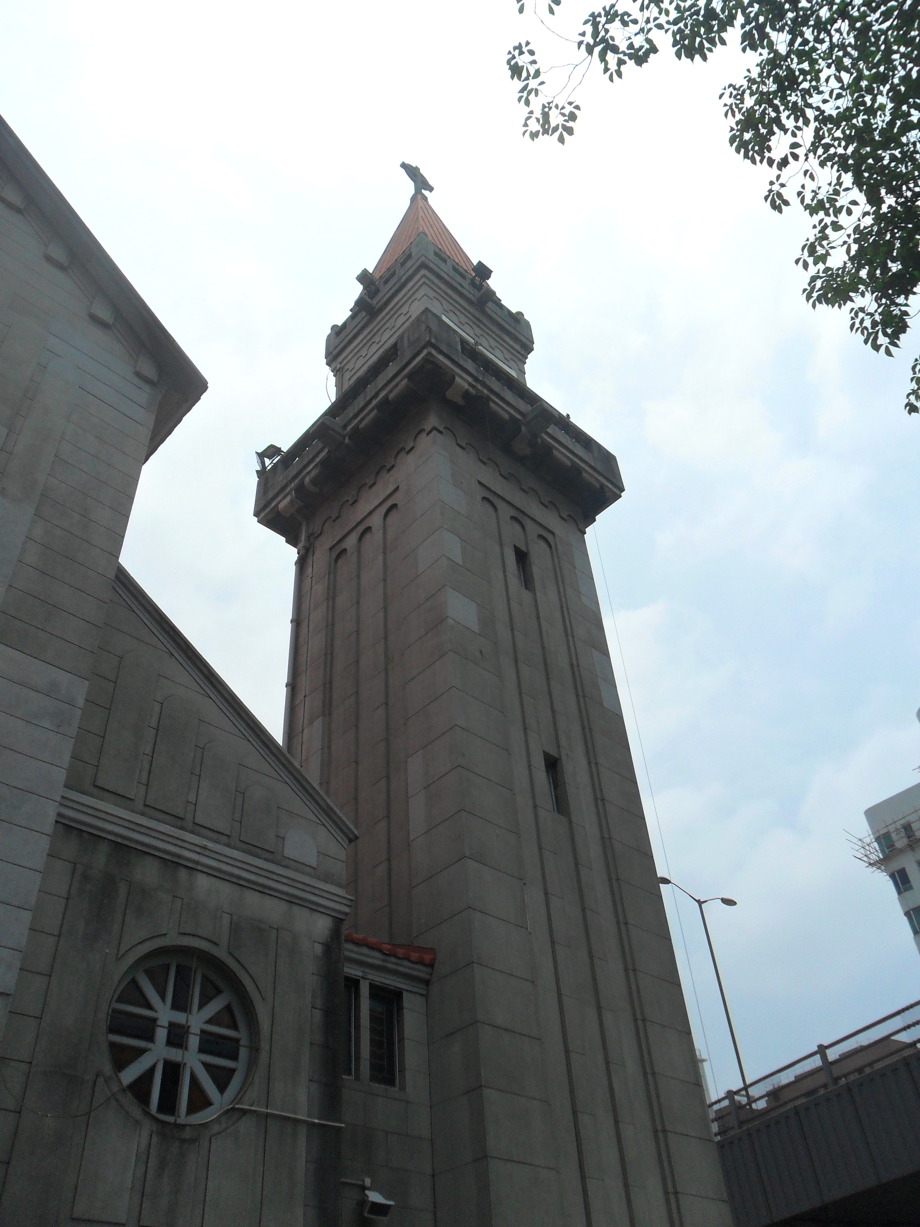 中文（香港）: 聖德肋撒堂, 香港, 中國